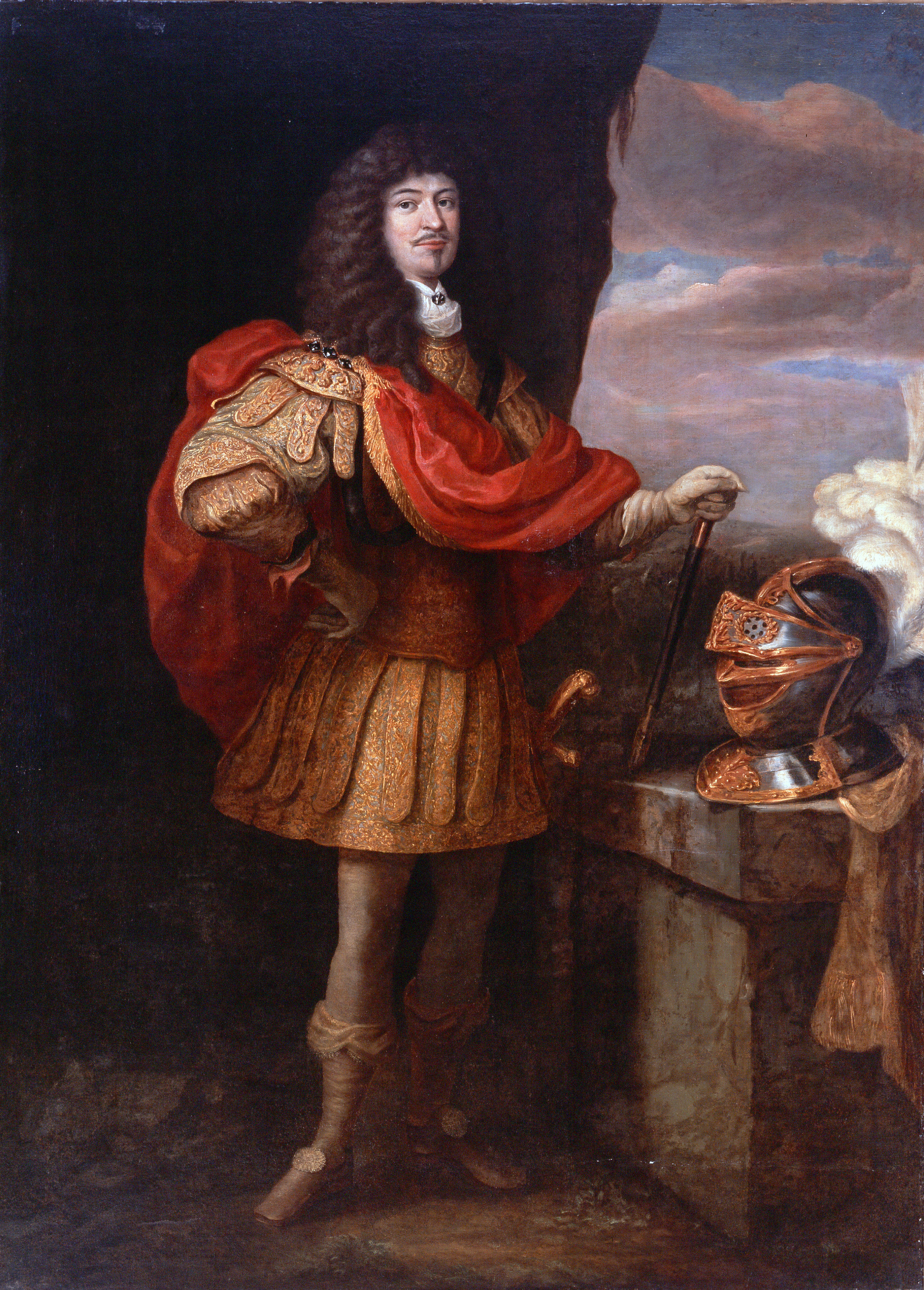 Portret van Christiaan Albrecht van Sleeswijk-Holstein-Gottorp (1641-1695)